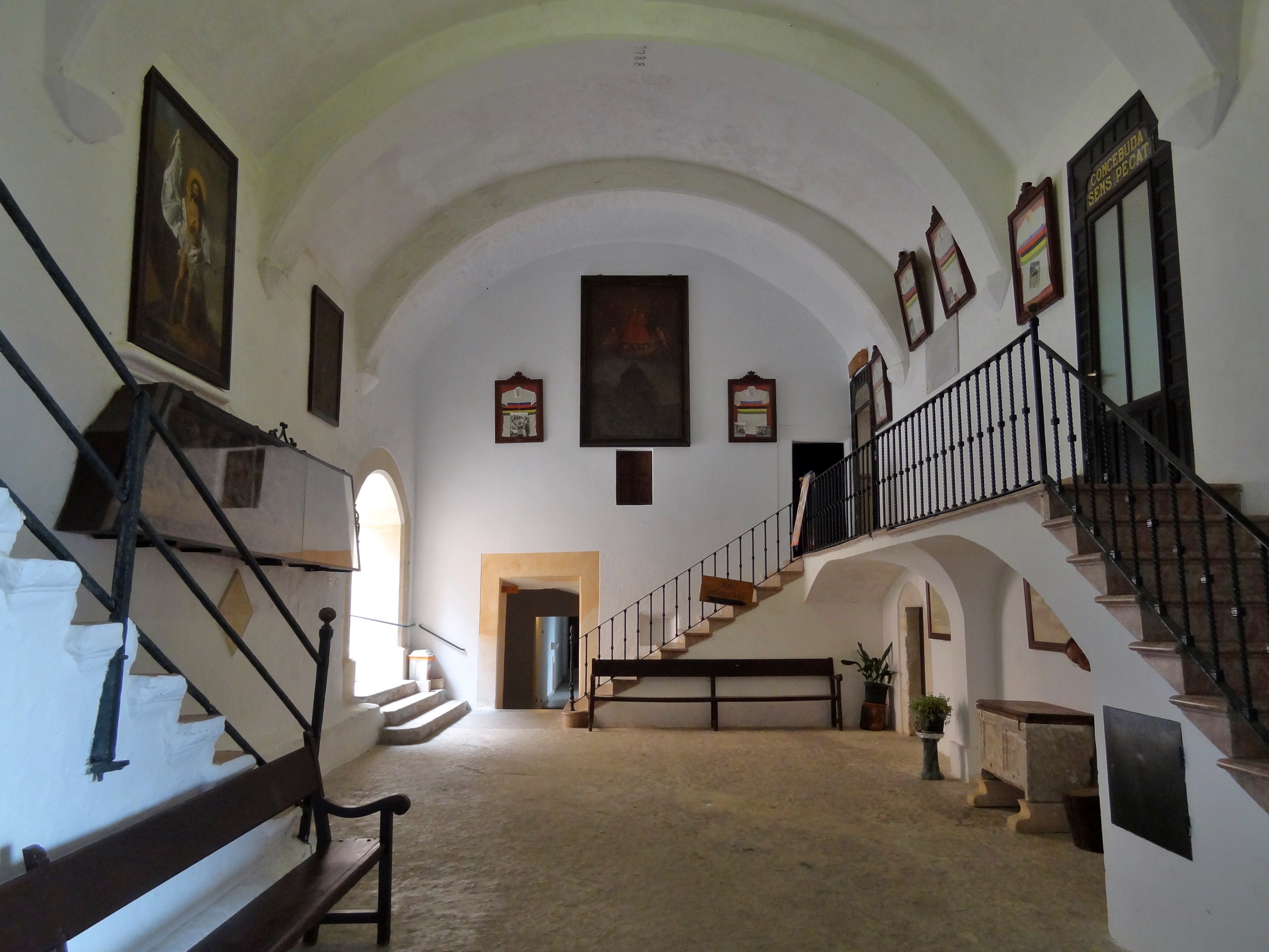 Santuari de Sant Salvador, Gemeinde Felanitx, Mallorca, Spanien